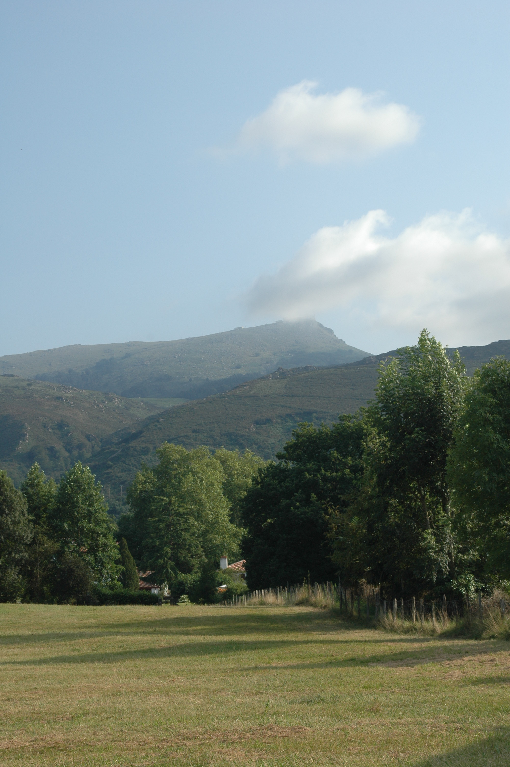 La Rhune, vue d'Ascain. Photo prise le 23/07/06 par Harrieta171